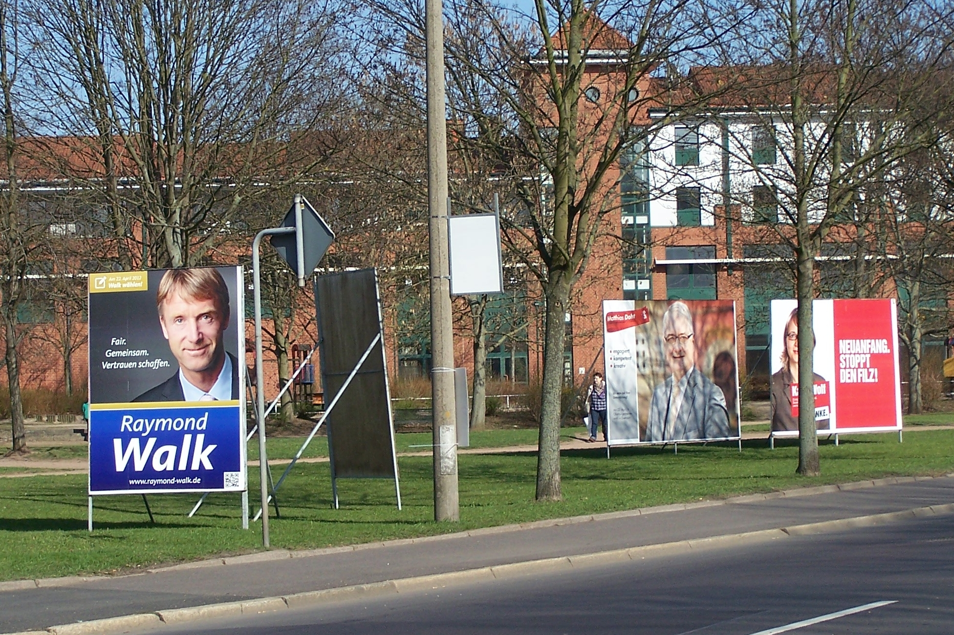 Zur Thüringer Kommunalwahl 2012: Plakatwerbung einiger Kandidaten für das Amt des Eisenacher Oberbürgermeisters am 22. April 2012, hier in der Clemensstraße am Nordausgang des Hauptbahnhofes.